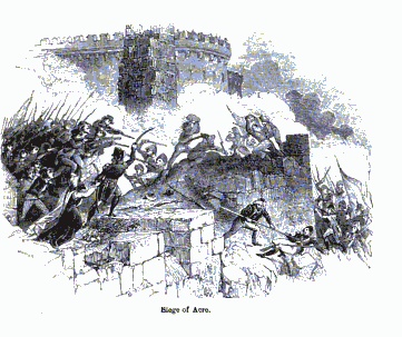 Siege of Acre